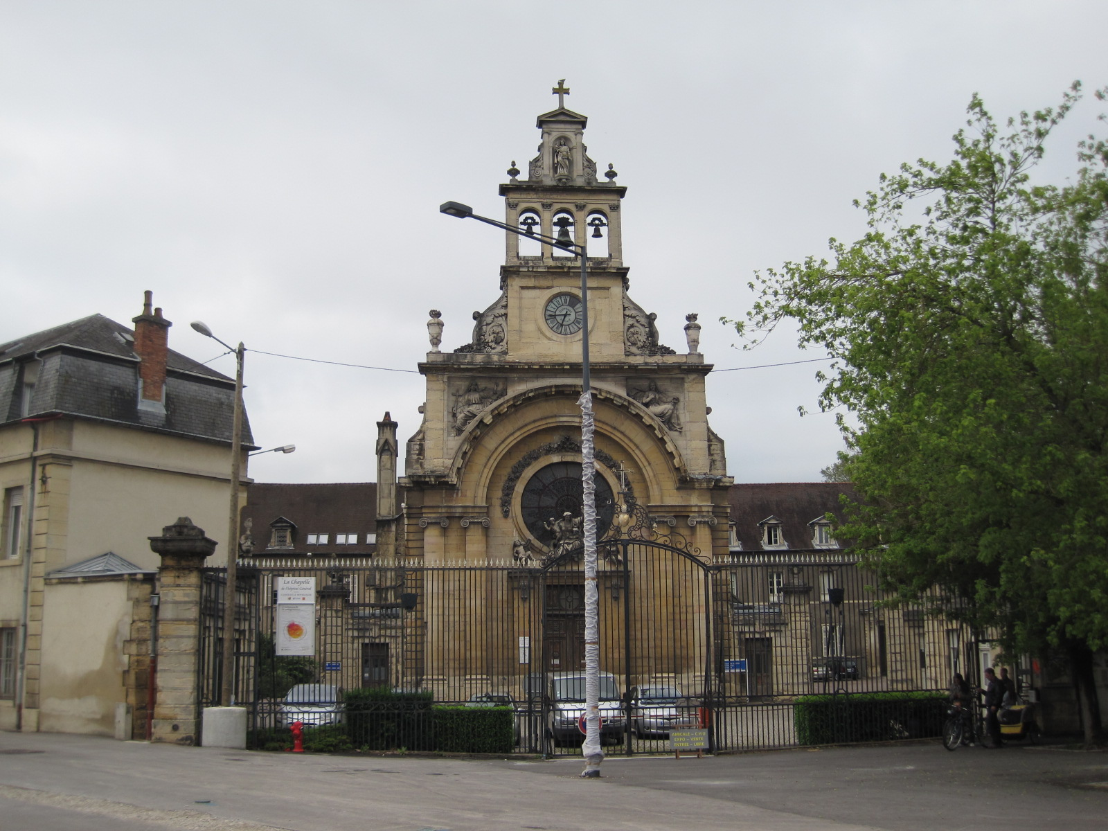 Hospices de Dijon